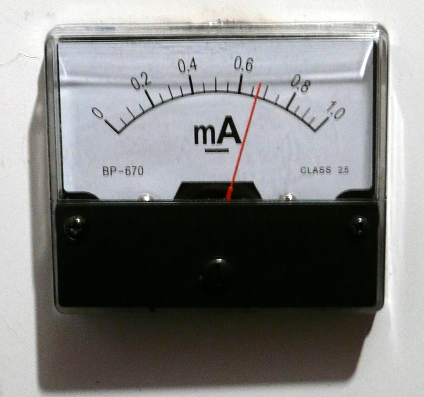 Korrosionsscchutzstrommessgrät an einer kathodischen Korrosionsschutzanlage